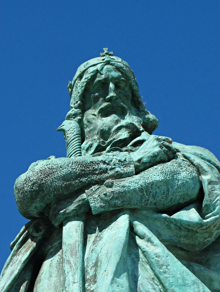 IV. Béla szobra a Hősök téri Millenniumi emlékművön, Budapesten